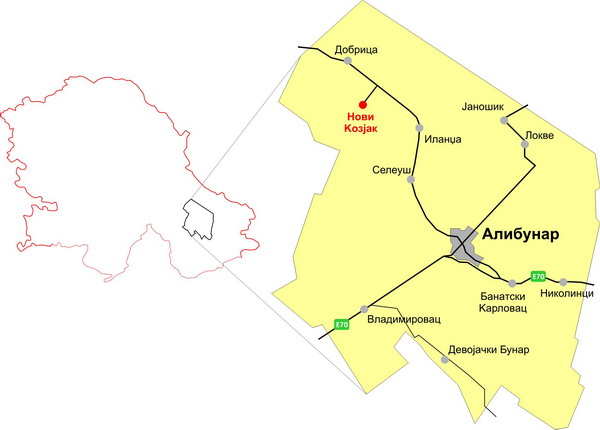 Положај села Нови Козјак у општини Алибунар.